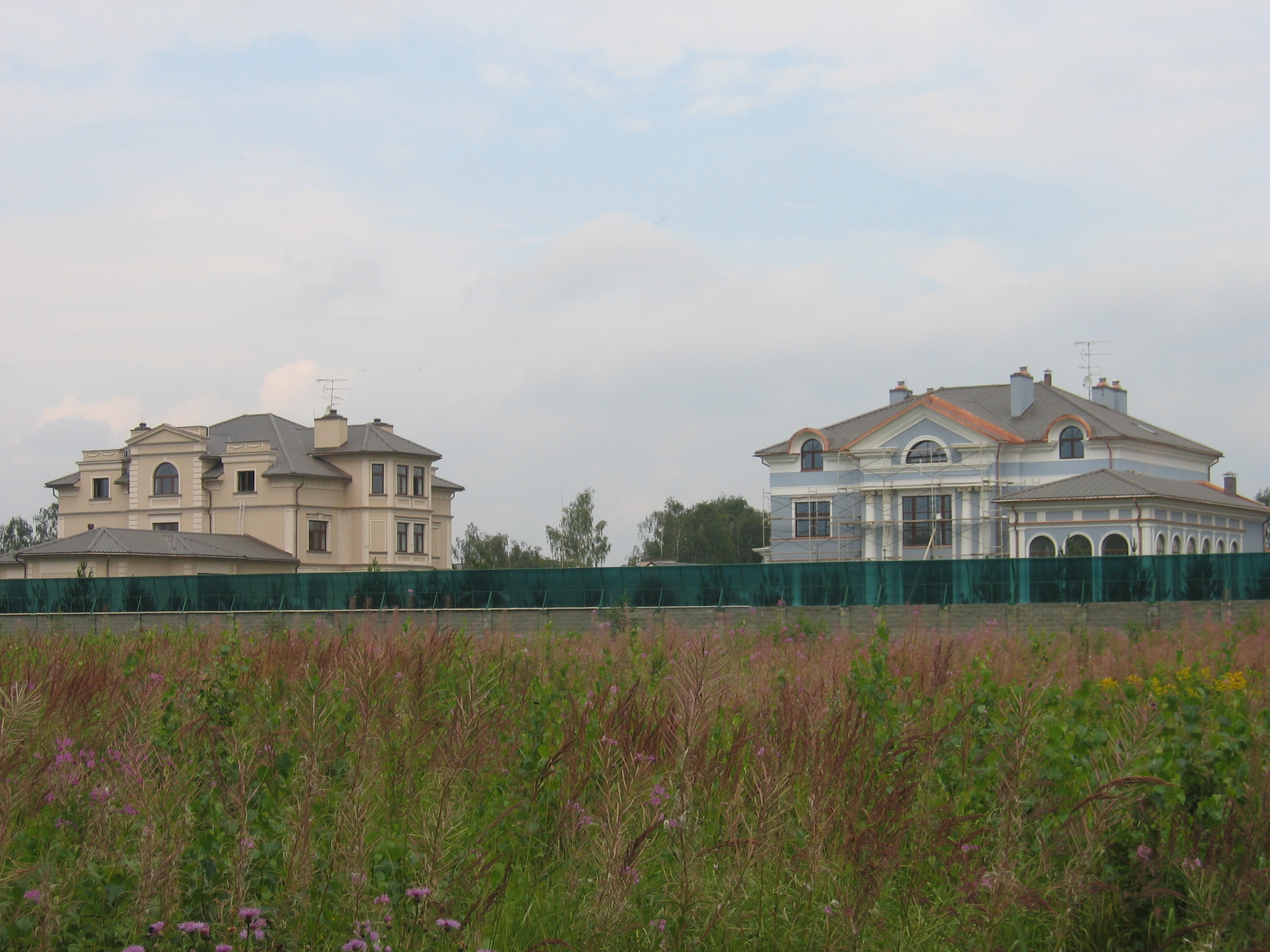 Fast fertiggestellte Villen in Ussowo, Russland